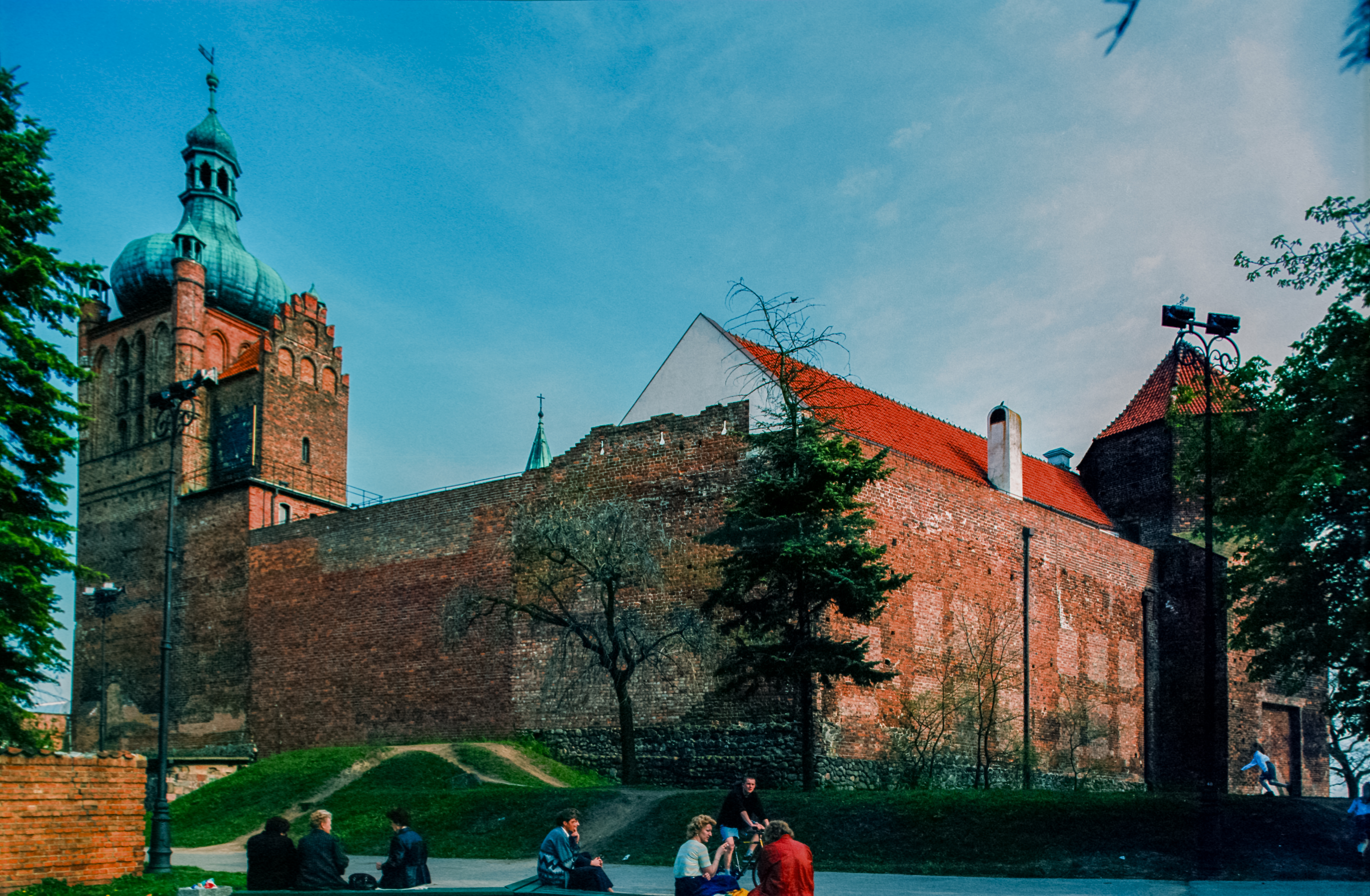 Płock